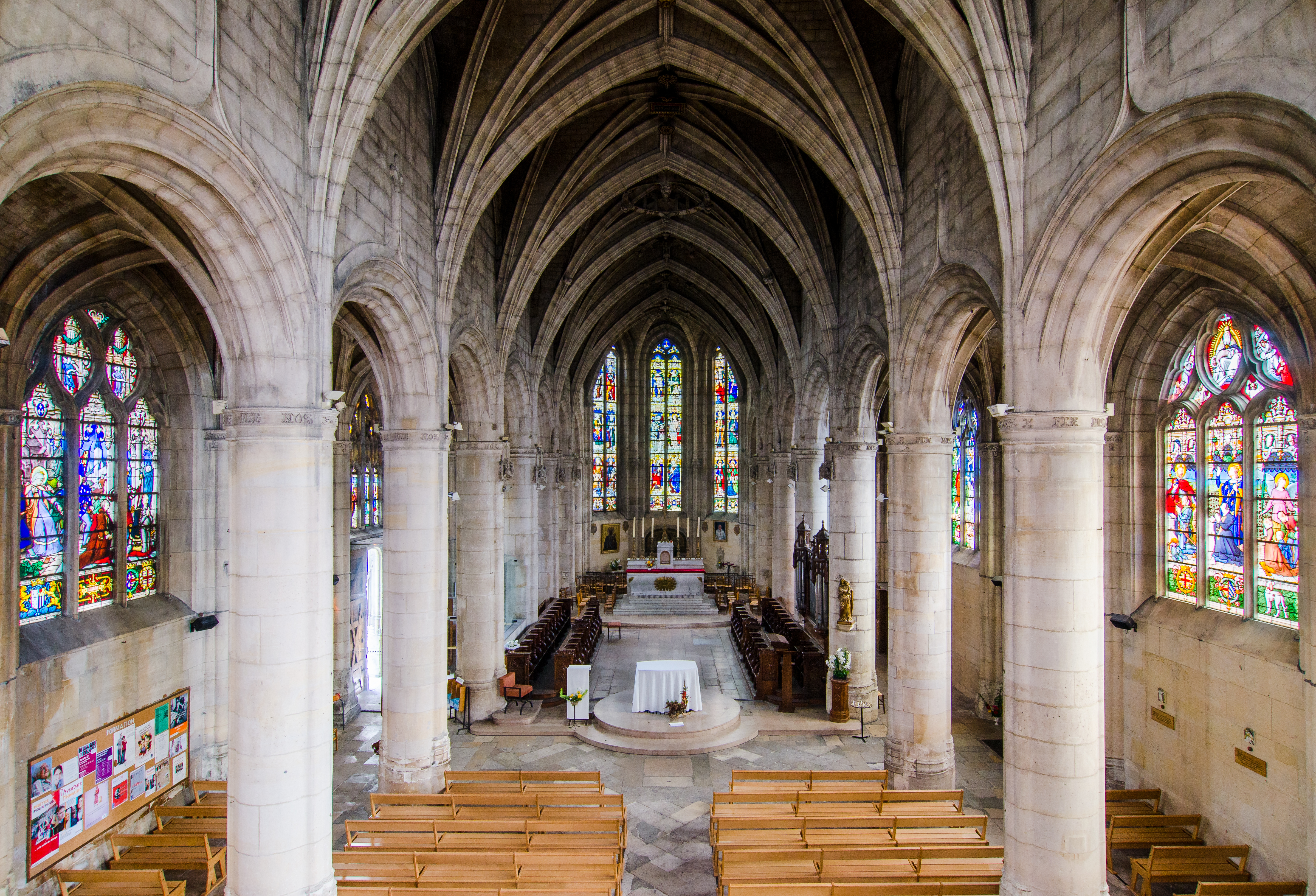 La nef de la collégiale de Montmorency vue de la tribune de l'orgue